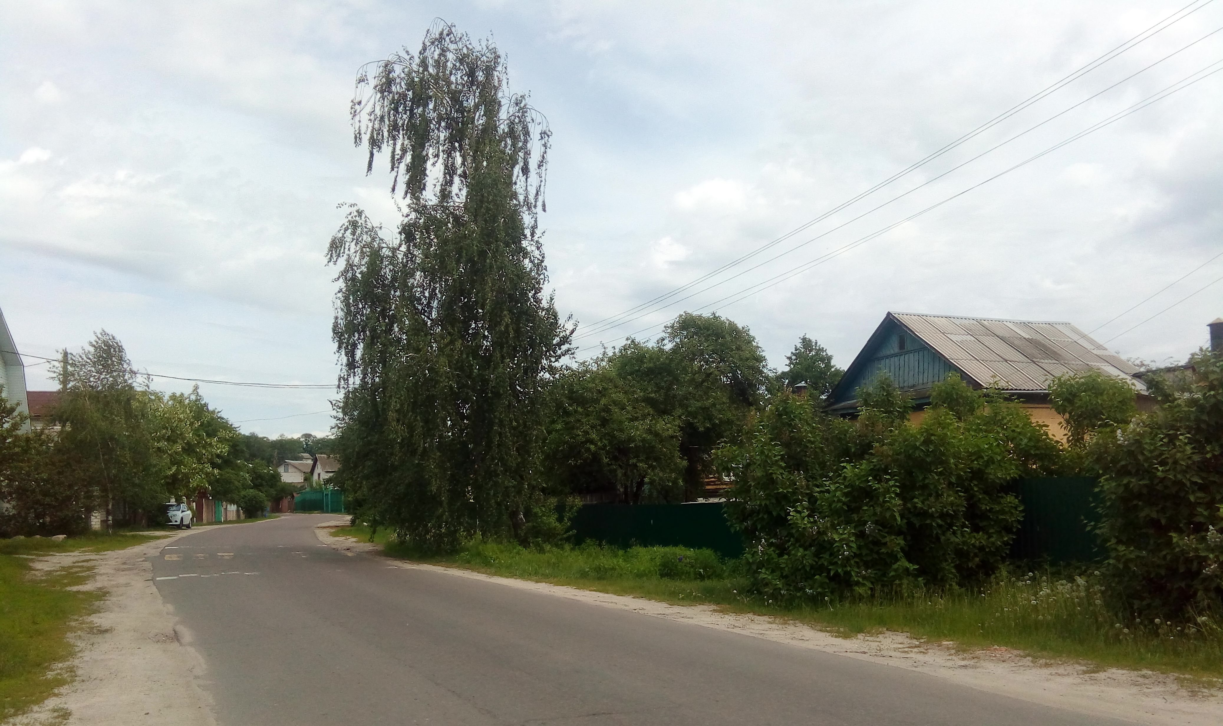 Улица в Монастырьке, историческом районе Гомеля